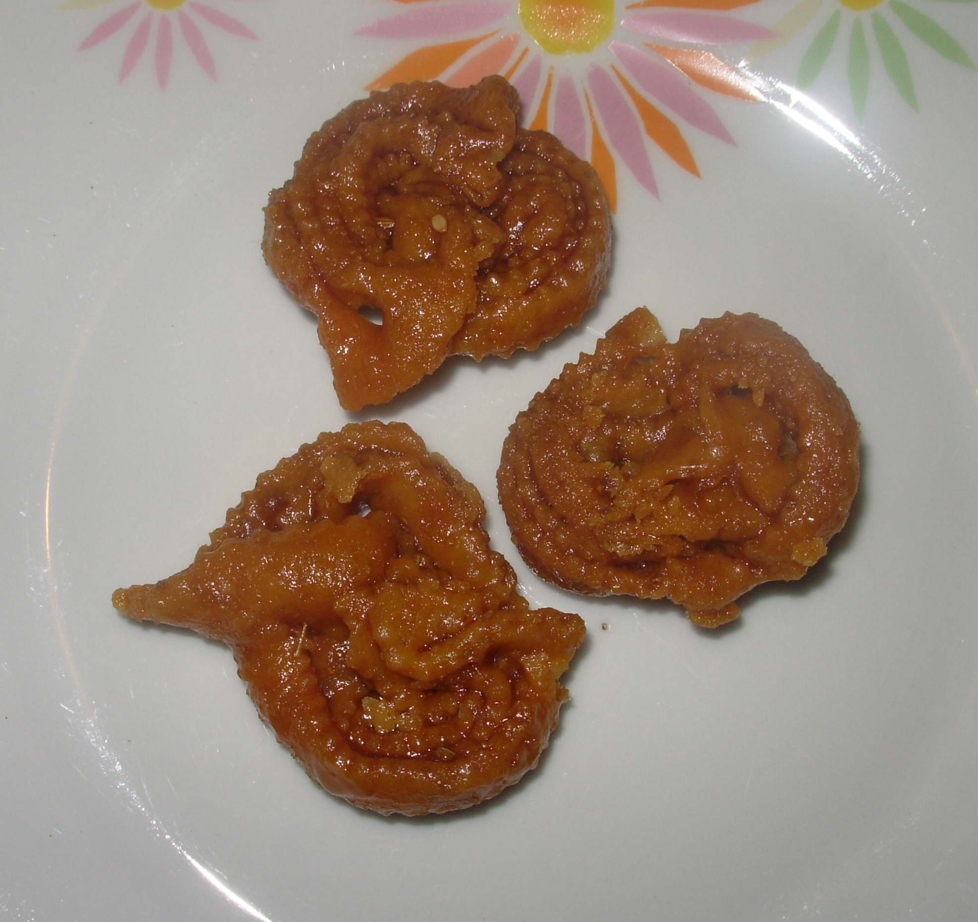 Chebakia, pâtisserie marocaine